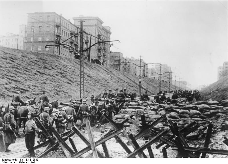 An der Sowjetfront: Am Ostausgang von Charkow mussten von den Sowjets hartnäckig verteidigte Barrikaden erst niedergekämpft werden. PK-Aufnahme. Kriegsberichter: Herber; Scherl 9956-41 Okt.41 Information added by Wikimedia users. Спуск Пассионарии, вид в сторону Госпрома от Клочковской, октябрь 1941 (после 25 октября).